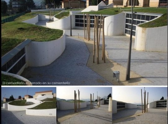 Hilerriaren handitzea